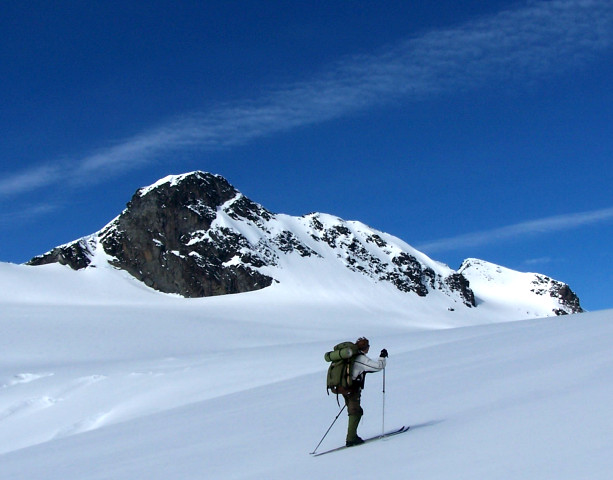 Skiløper på Bukkeholsbreen med Store Bukkeholstinden i bakgrunnen. Foto: Tore Røraas.